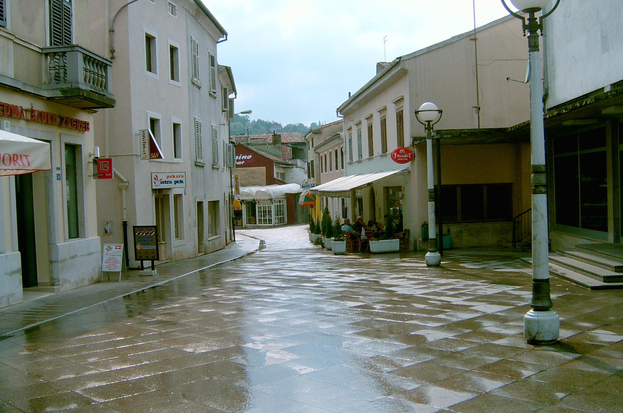 Пазин, центар.